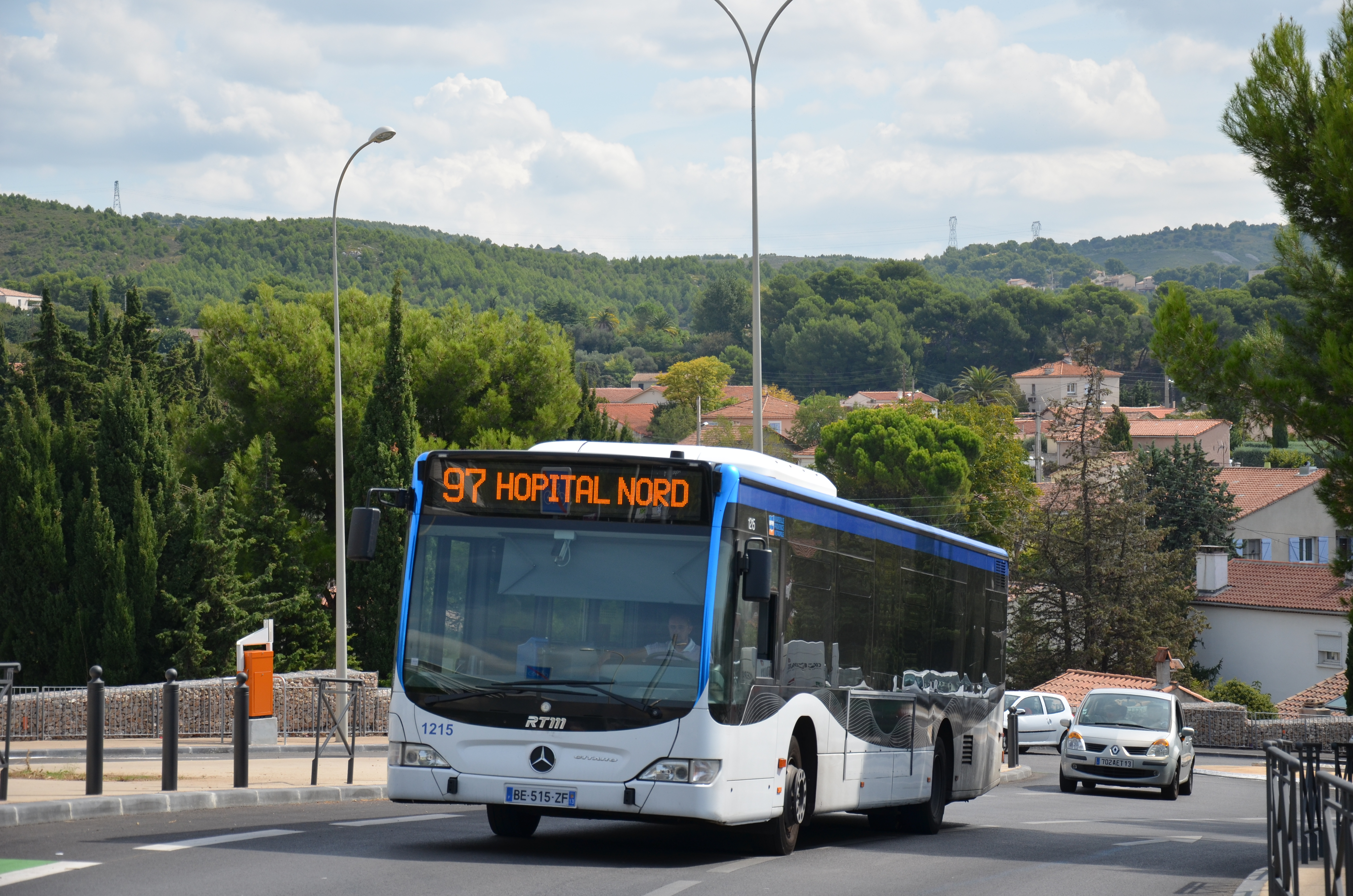 Mercedes Citaro n°1215 sur la ligne 97, près de son terminus Hôpital Nord.